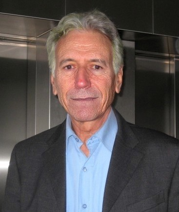 Photo prise spécifiquement pour enrichir l'article wikipedia du même nom ; à l'intérieur du lycée Fénelon (Paris, 6e arrdt) où il enseigne en tant que professeur de philosophie pour les khâgnes classiques.